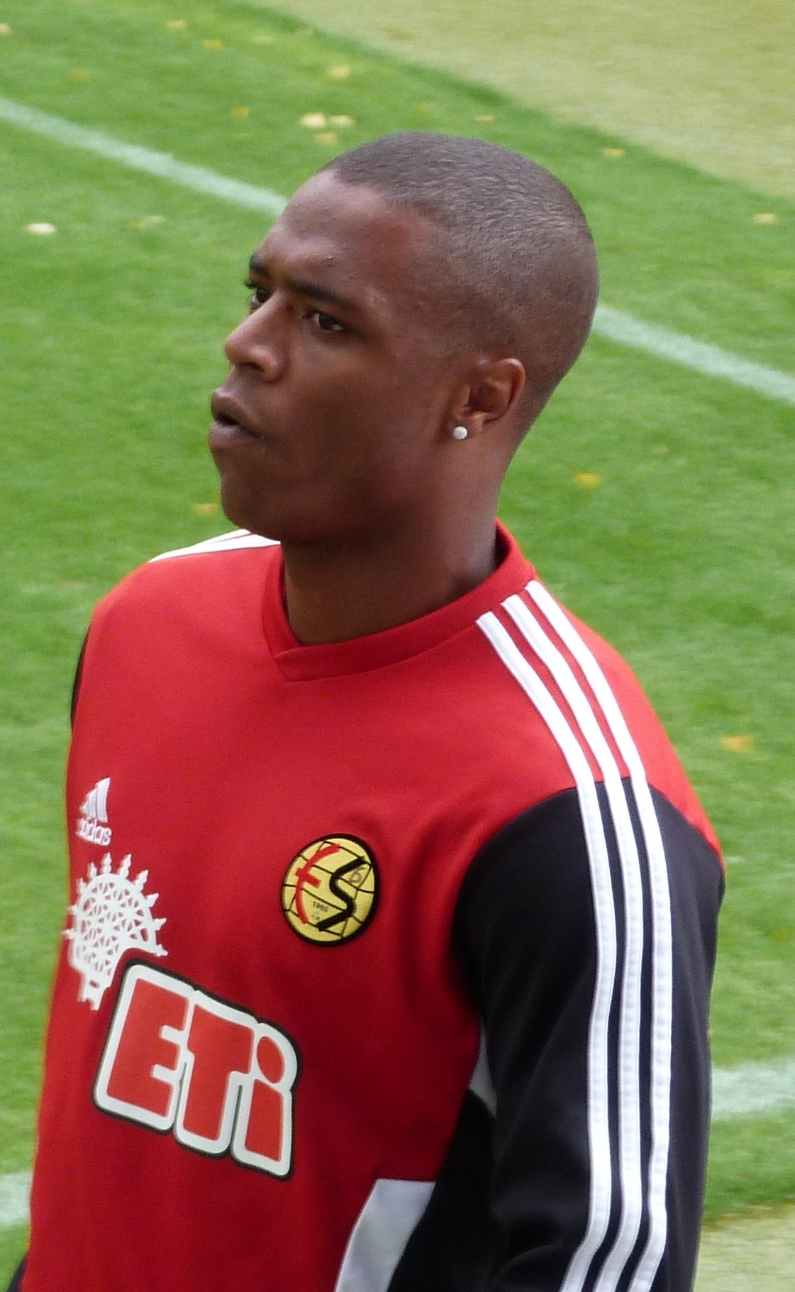 Pele